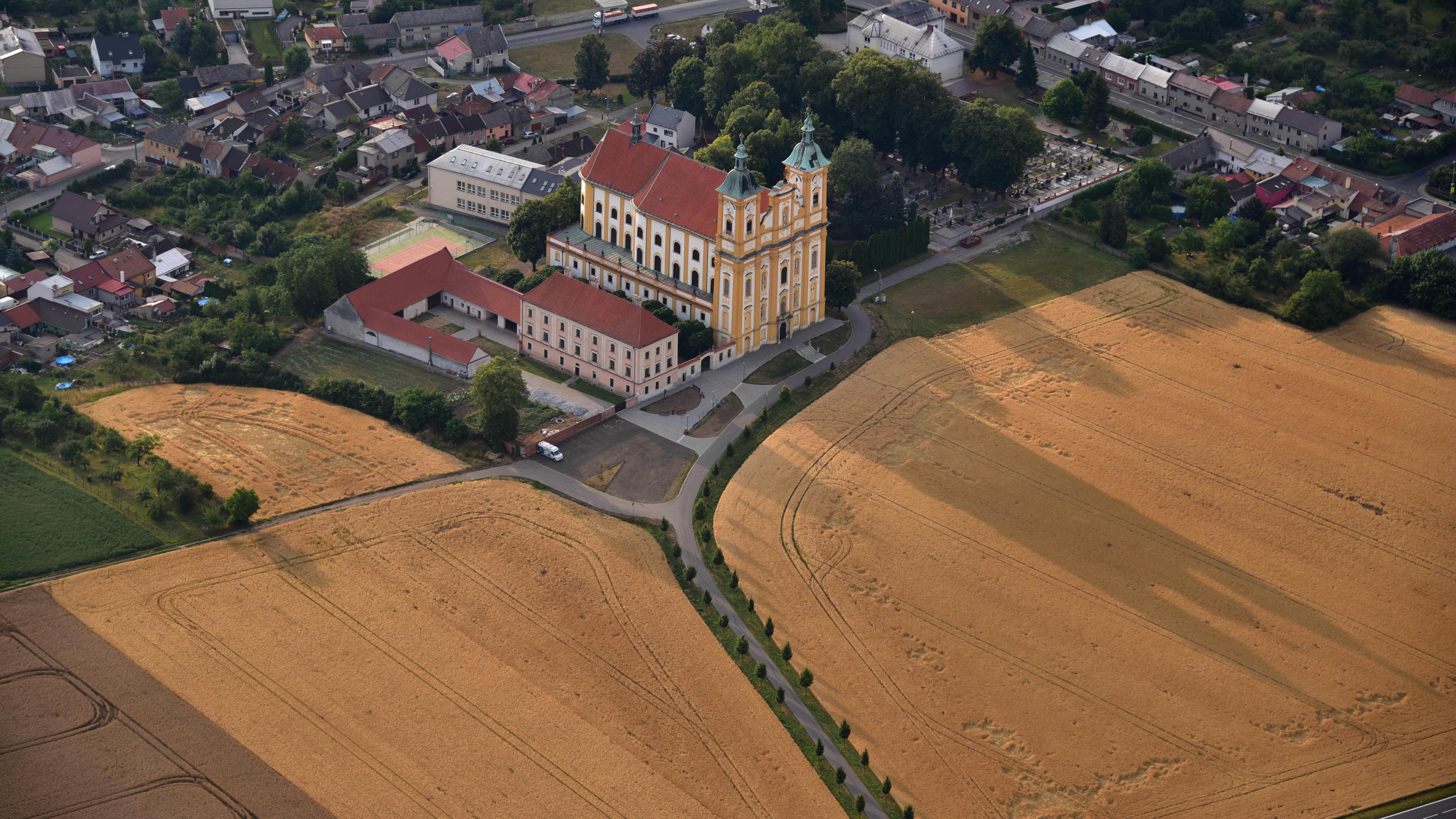 CZ - Dub nad Moravou, Walfahrtskirche, Luftaufnahme (2018)